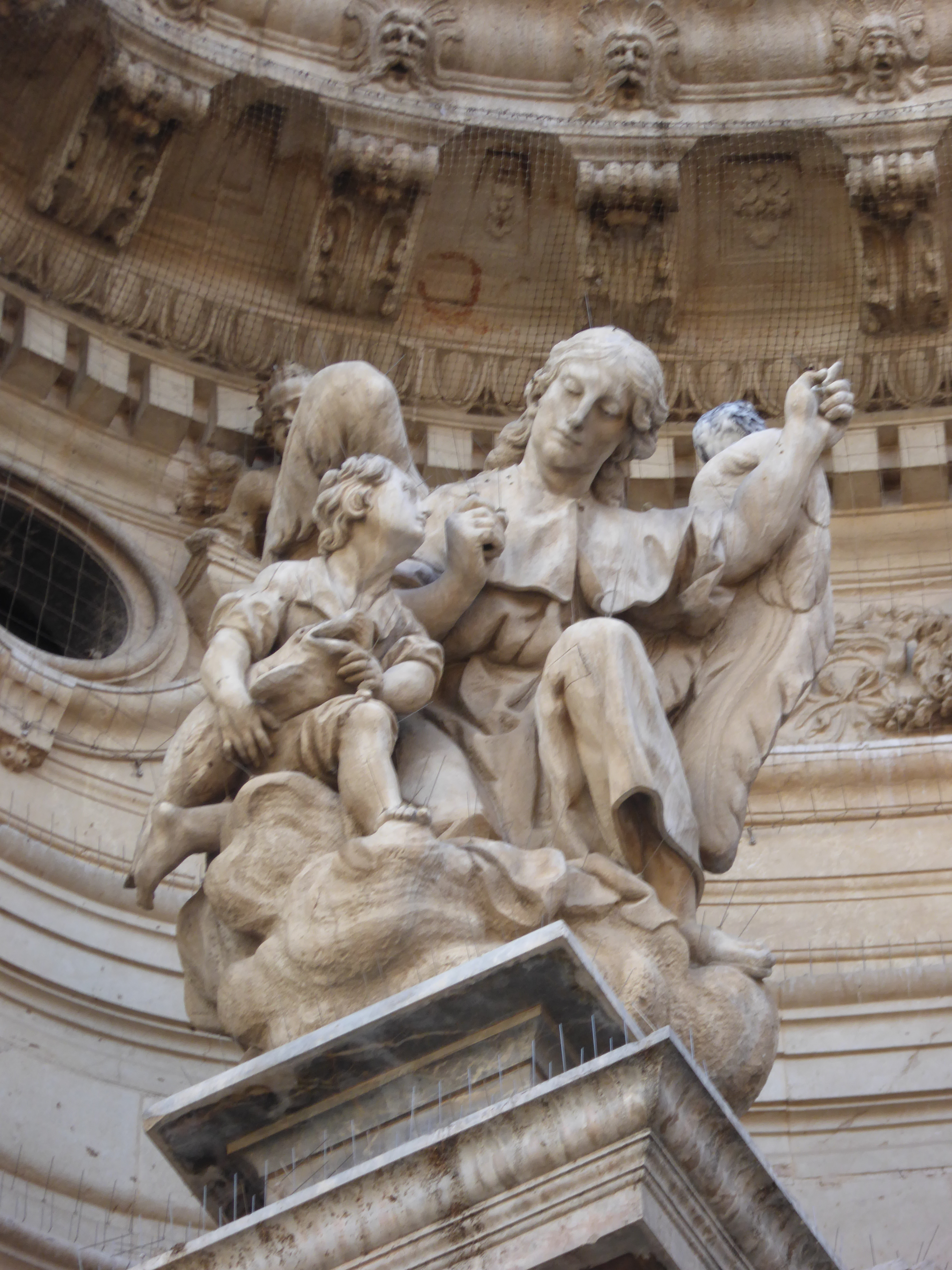 Catedral de Murcia